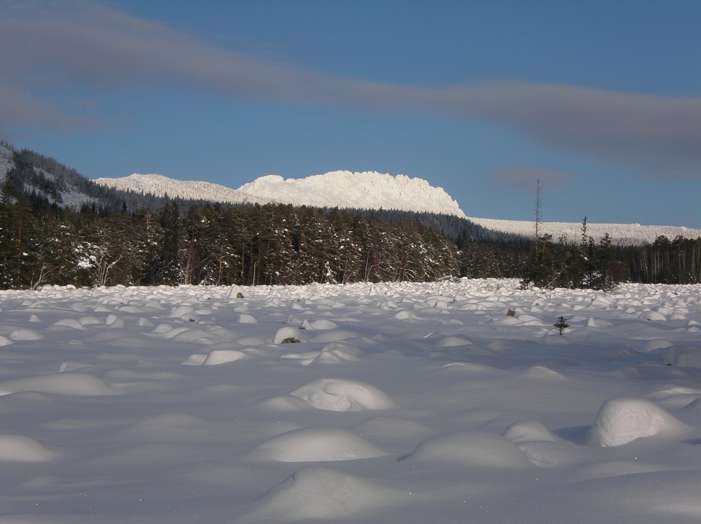 Откликного гребня Таганая.